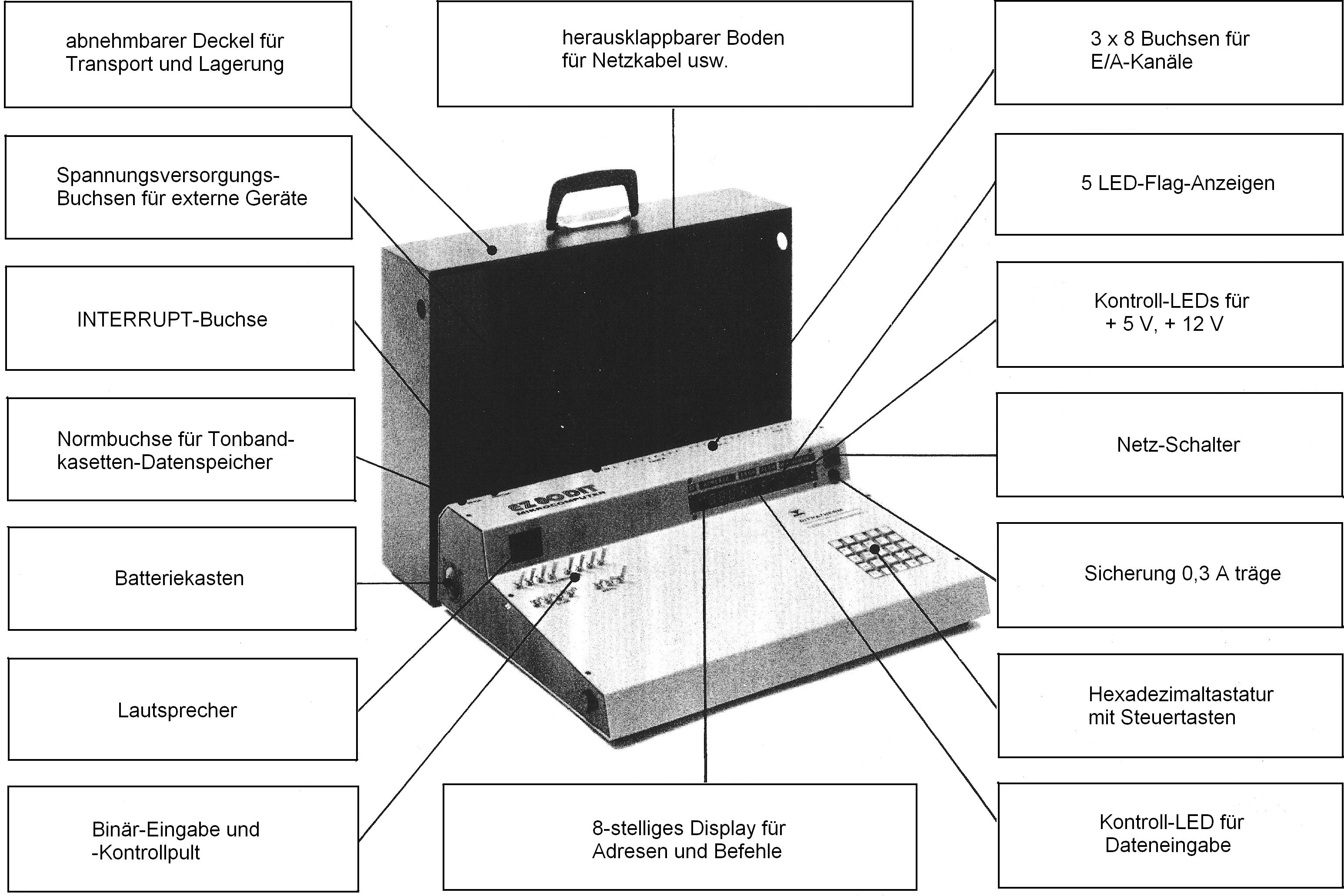 Einplatinen Mikrocomputersystem EZ80DIT Systemuebersicht